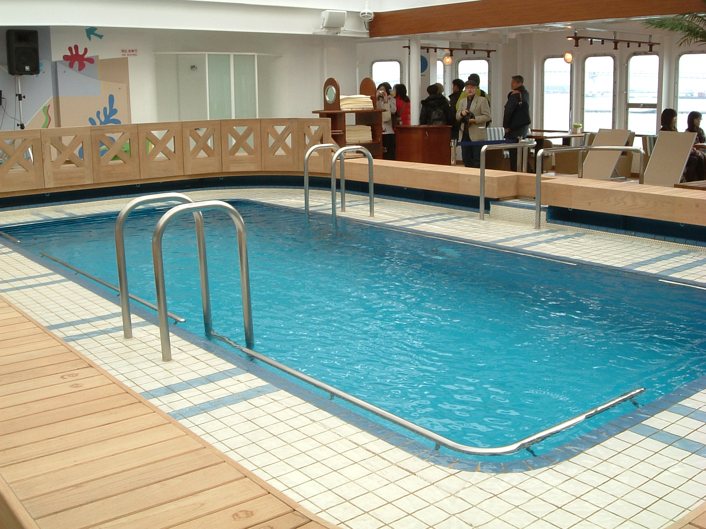 豪華客船にっぽん丸のプール